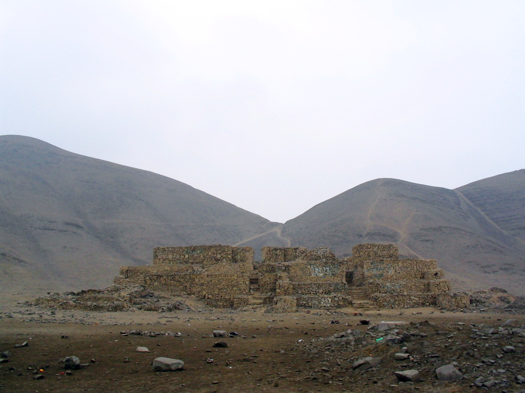 restos arqueológicos del complejo arquitectónico de El Paraíso.